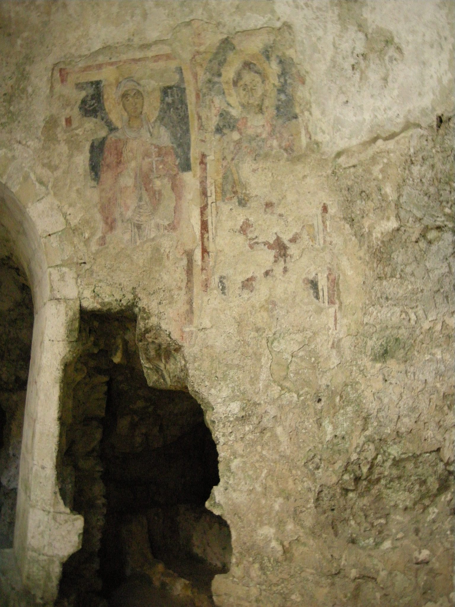 Siracusa, neapolis, cripta di san marciano 07 affreschi